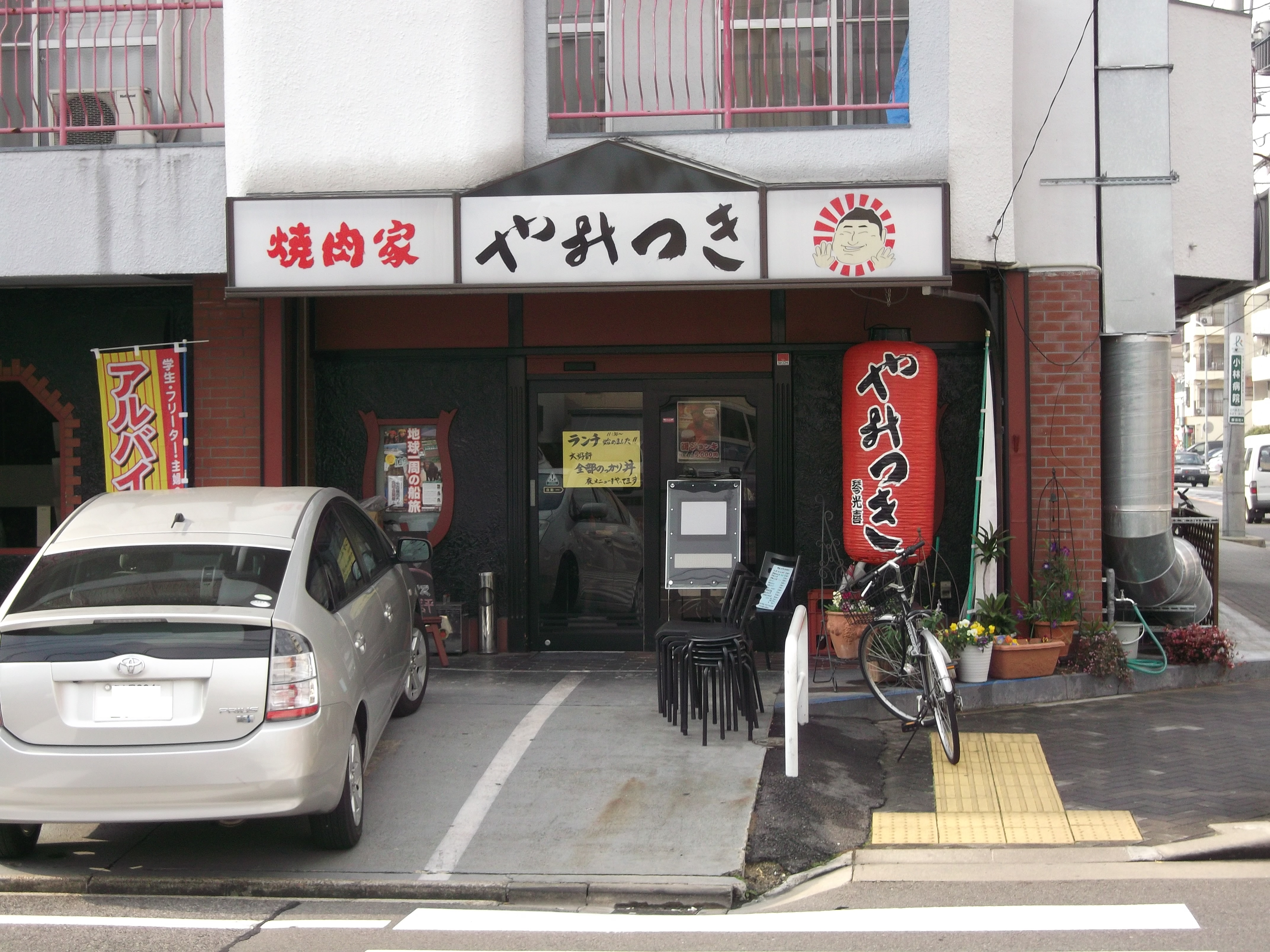 名古屋市西区香呑町にある焼肉屋「焼肉家やみつき」の外観